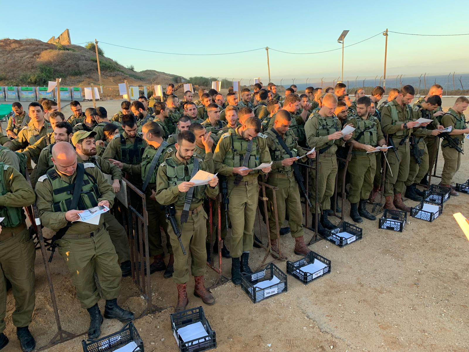 בוחן כשירות קרבי